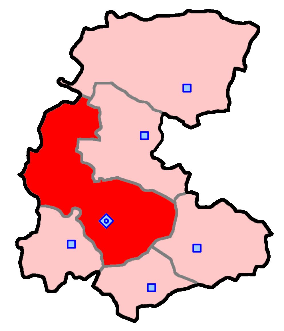 حوزهٔ انتخاباتی اراک و کمیجان و خنداب برای انتخابات مجلس شورای اسلامی